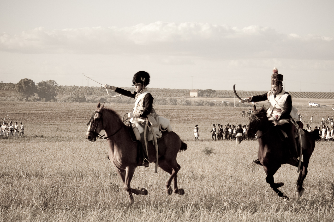 El momento exacto